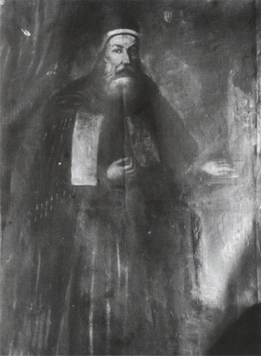 Беларуская (тарашкевіца): Партрэт Язэпа Солтана (Jazep Sołtan)